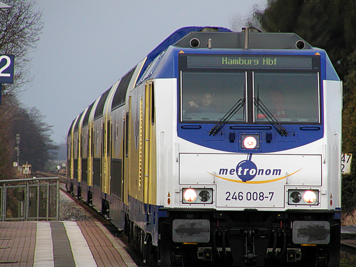 Der Metromom nach Hamburg fährt im Cadenberger Bahnhof ein